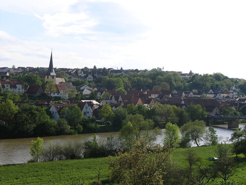 Benningen am Neckar Fotografiert von Mussklprozz am 8. Mai 2005